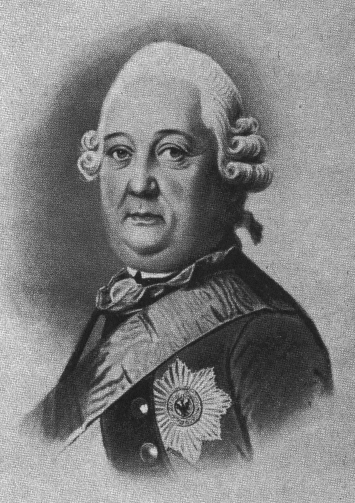 General Johann Albrecht von Bülow Datum: Mitte 18. Jahrhundert Quelle: Genealogisches Handbuch des Adels. v. Bülow, Band 92 der Gesamtreihe; Limburg (Lahn): C. A. Starke, 1987, S. 109 Urheber: unbekannter Maler